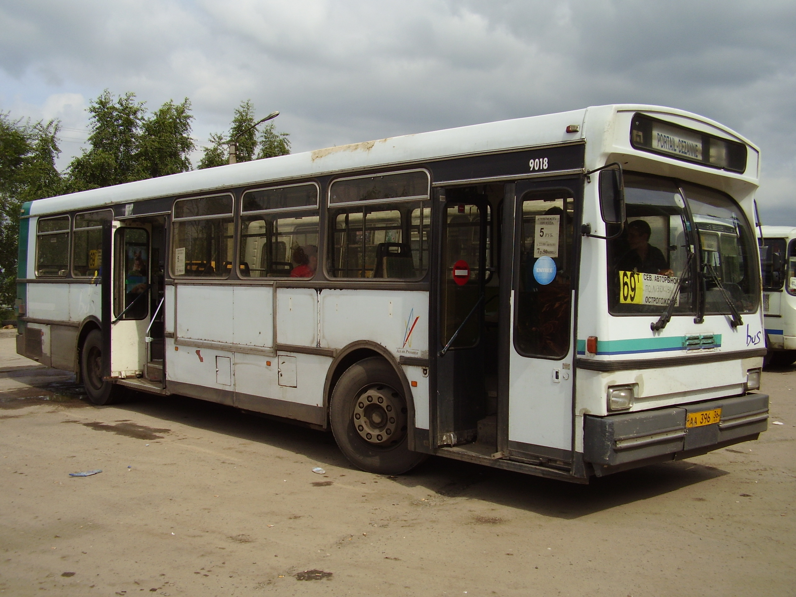 Автобус Heuliez в Воронеже. - Bus Heuliez in Voroneg